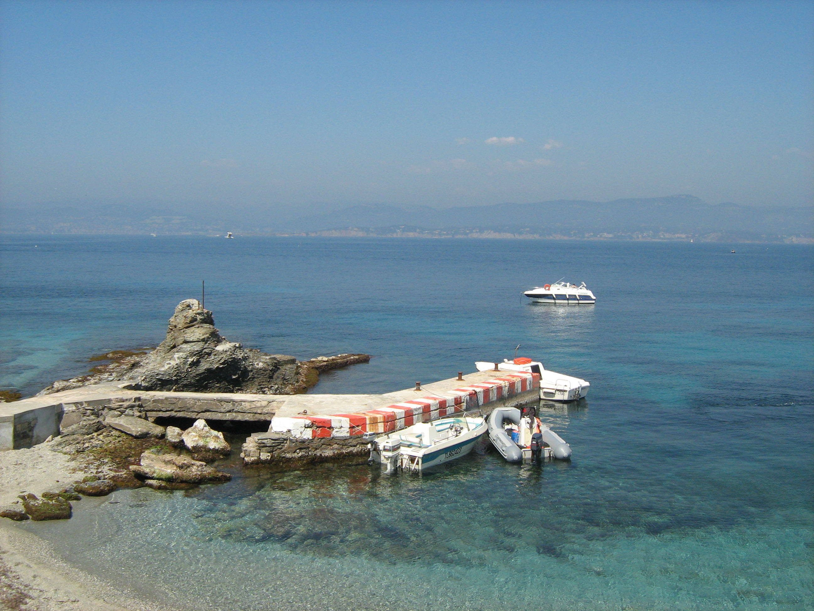 Ponton bateau du Grand Rouveau